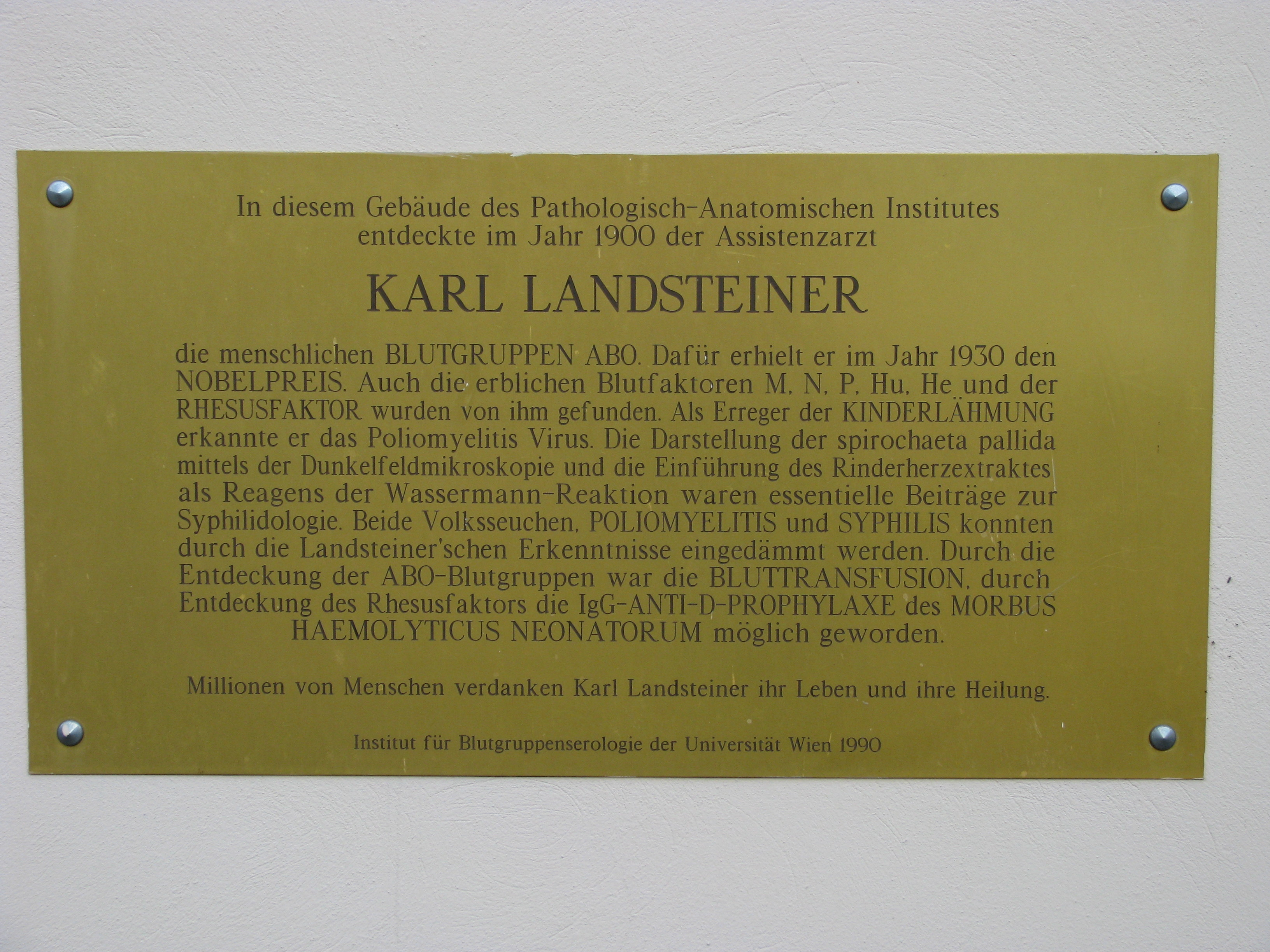 Pathologisch-Anatomisches Institut